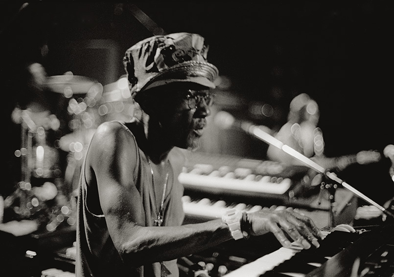 Bernie Worrell im E-Werk in Köln